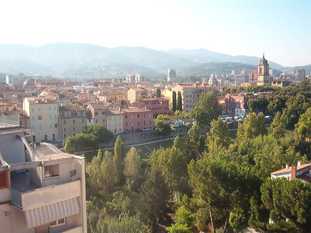 Il centro storico cittadino